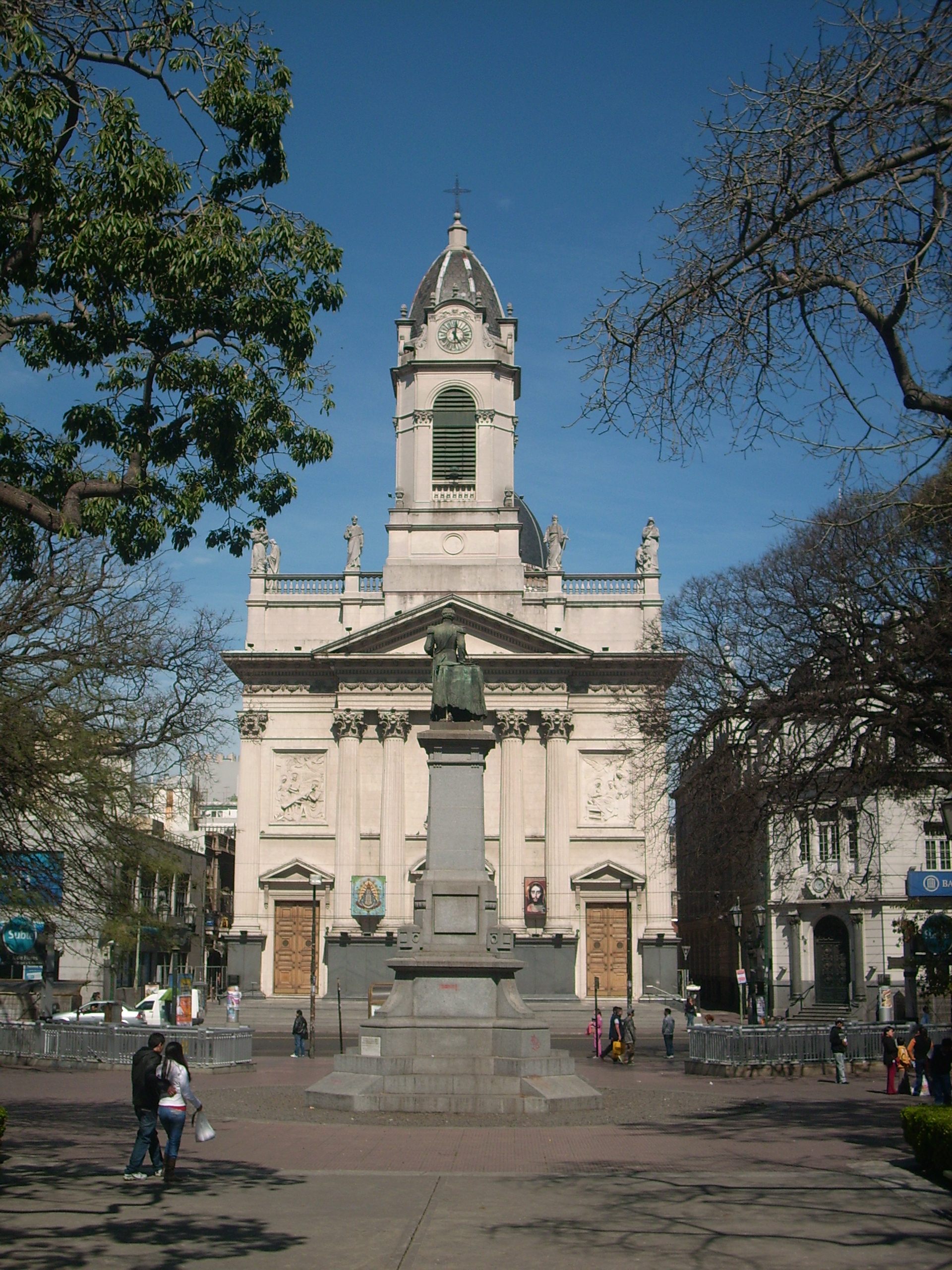 Basílica de San José de Flores